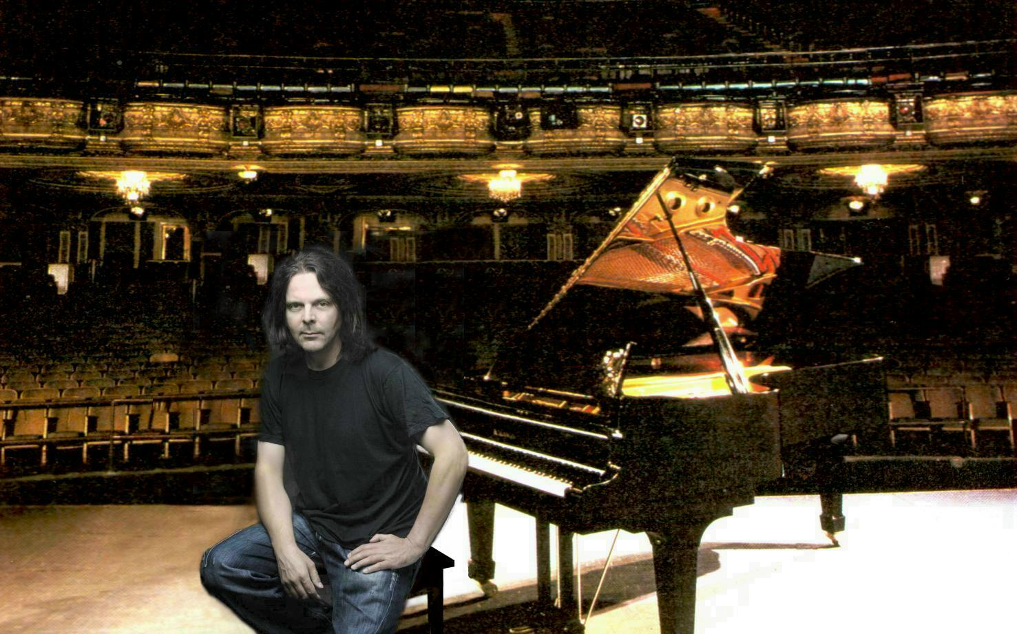 Alessandro Esseno prima di un concerto